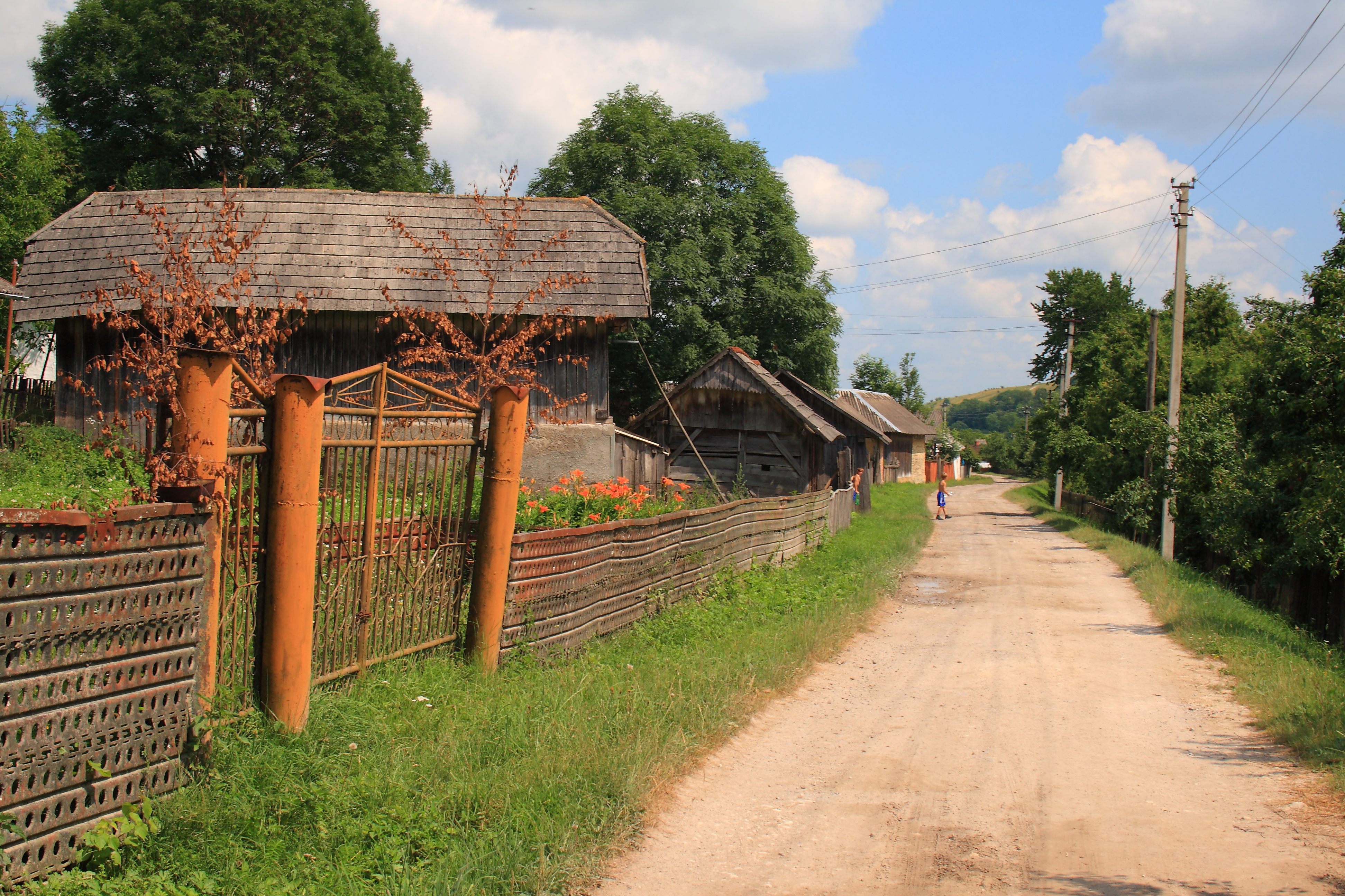 Вулиця в селі Тростянець Бережанського району Тернопільської області.